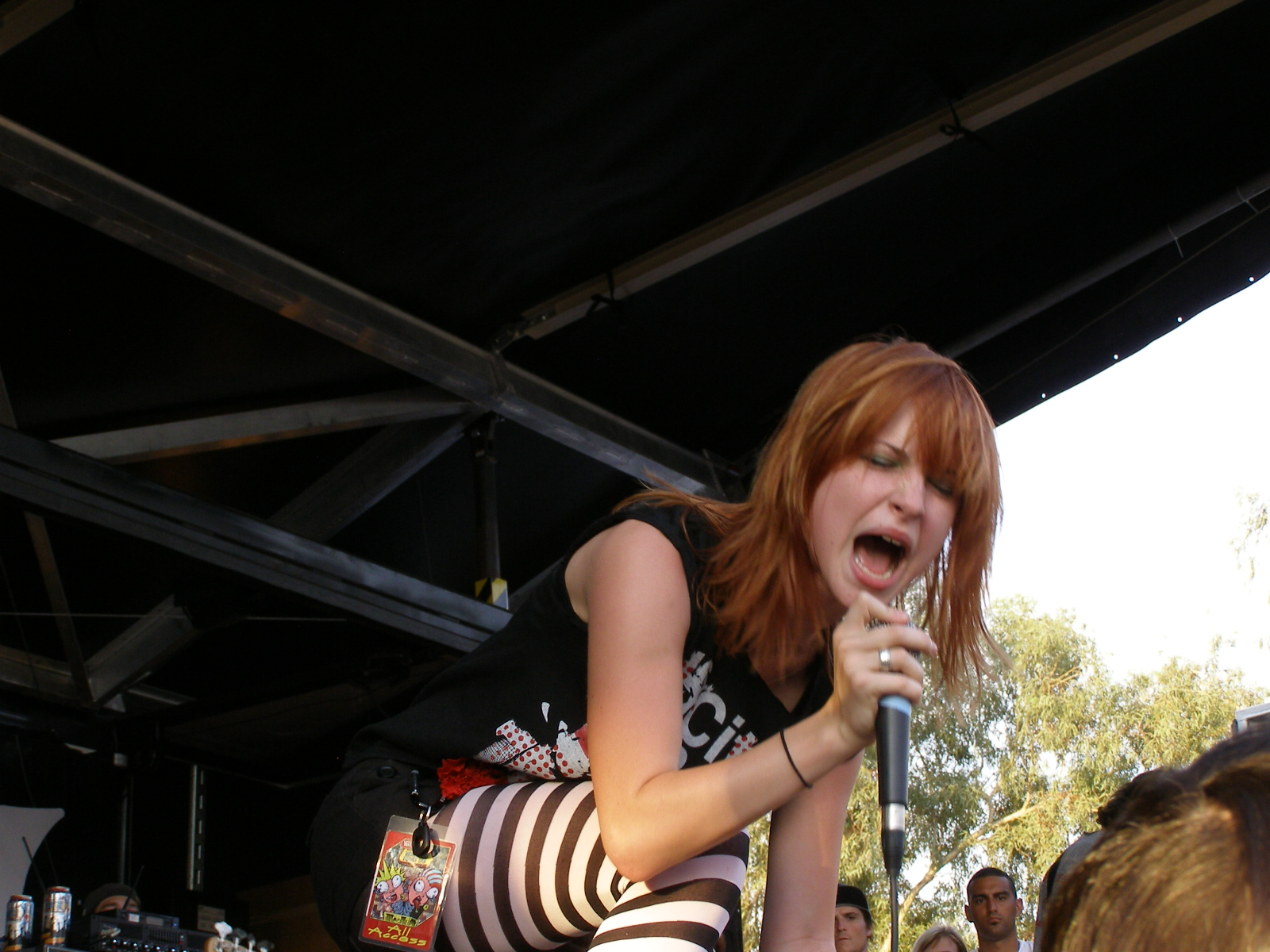 Hayley Williams junto a Paramore en un concierto del Warped Tour 2006.